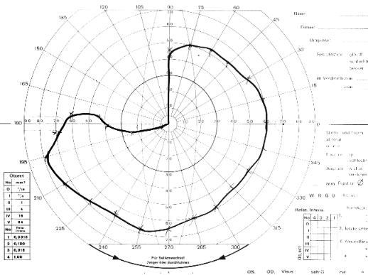 Gesichtsfeld mit teilweiser Anopsie, GFDL. Anonymisierte Kopie einer augenmedizinischen Aufnahme aus dem Bekanntenkreis mit Zustimmung des Betroffenen. Honina 09:46, 14. Jun 2004 (CEST)